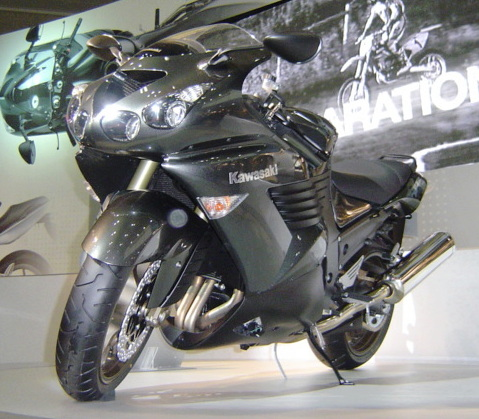 Kawasaki ZZR1400 2006 (2005 Tokyo Motor Show)